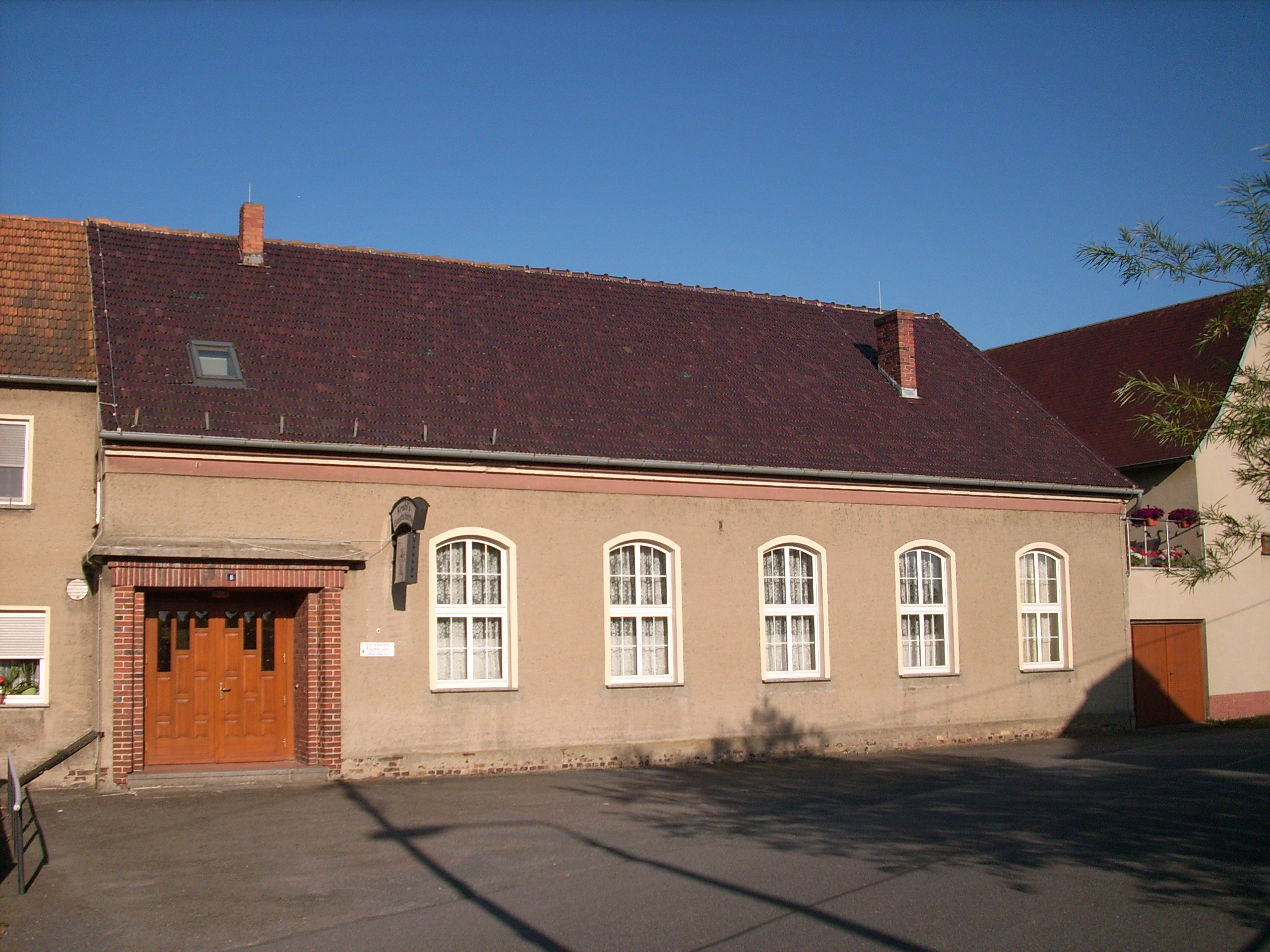 Gasthof in Koblenz, Ortsteil von Lohsa